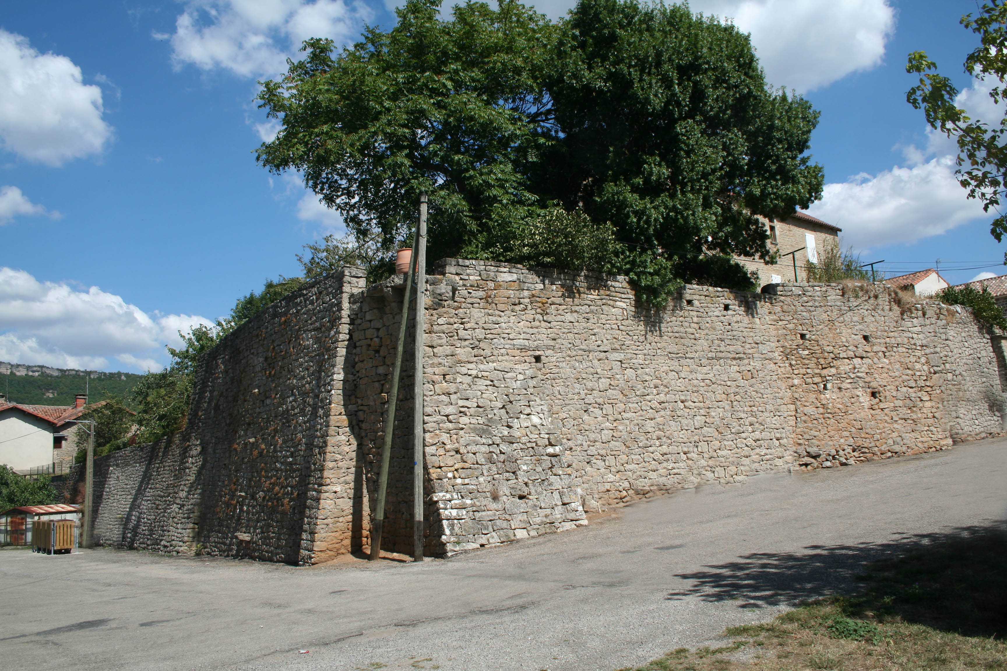 Saint-Beaulize (Aveyron) - murs du village.